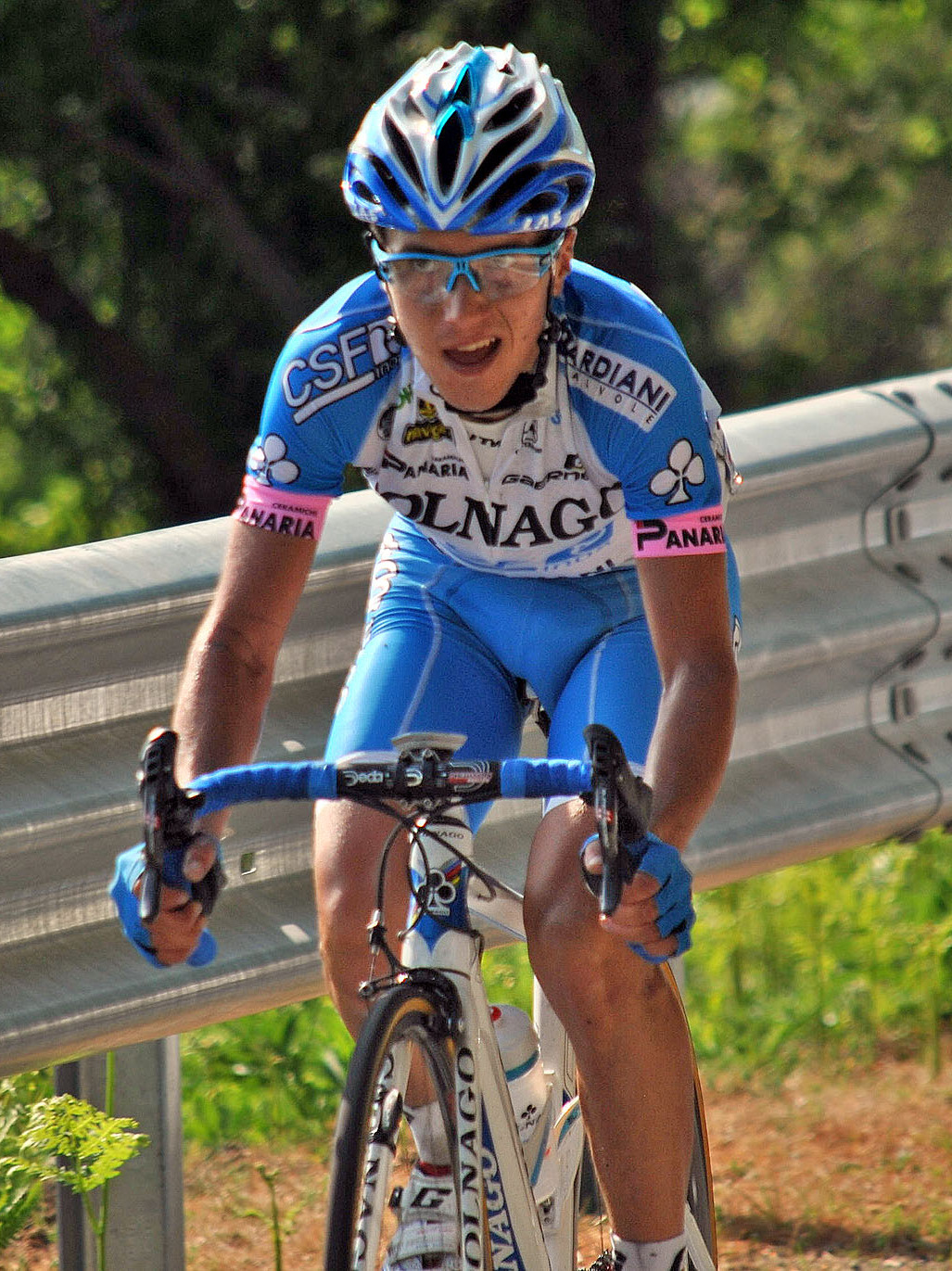 Pozzovivo